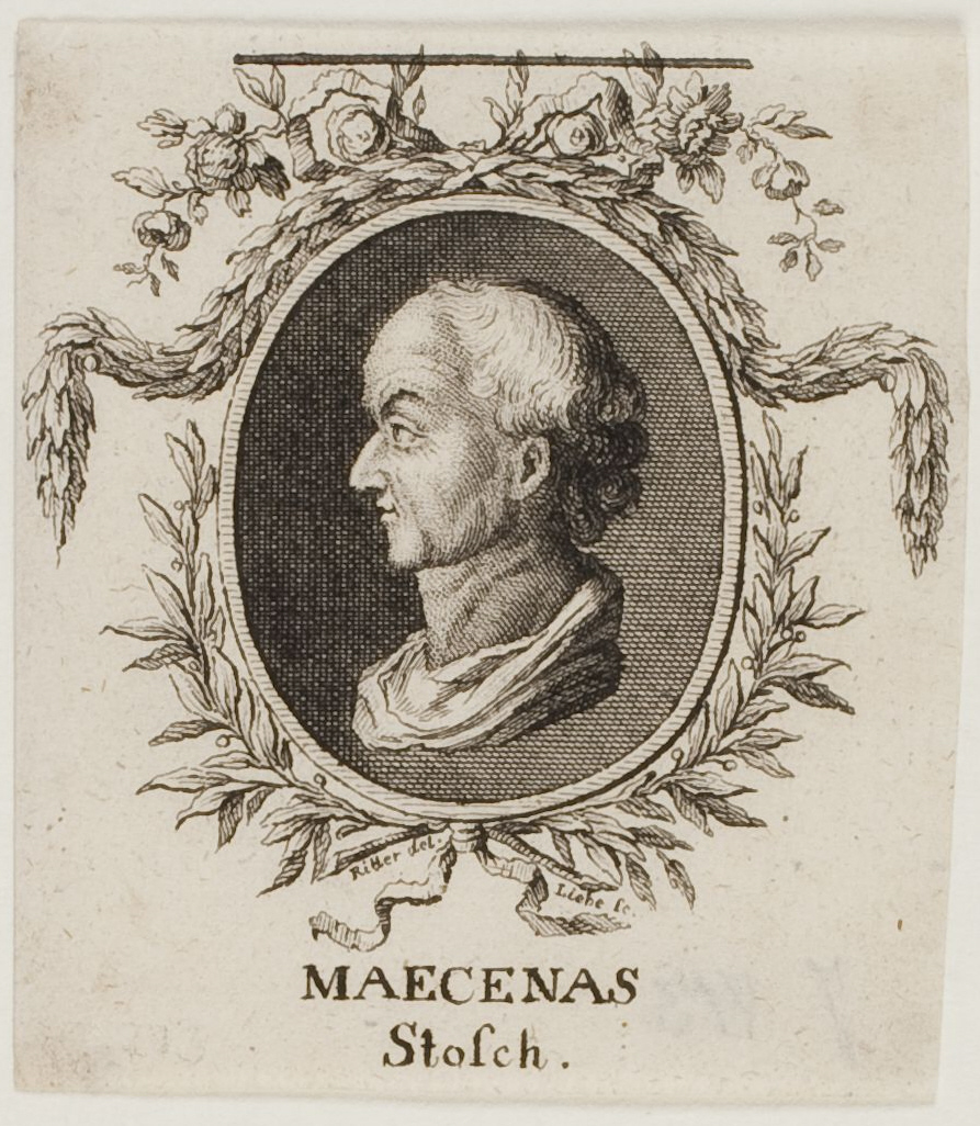 Bildnis Philipp von Stosch, Radierung, 6.8 x 6.1 cm (Blatt), Wolfenbüttel, Herzog August Bibliothek, Inventar-Nr. A 21236